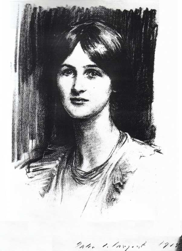 Angela Mackail